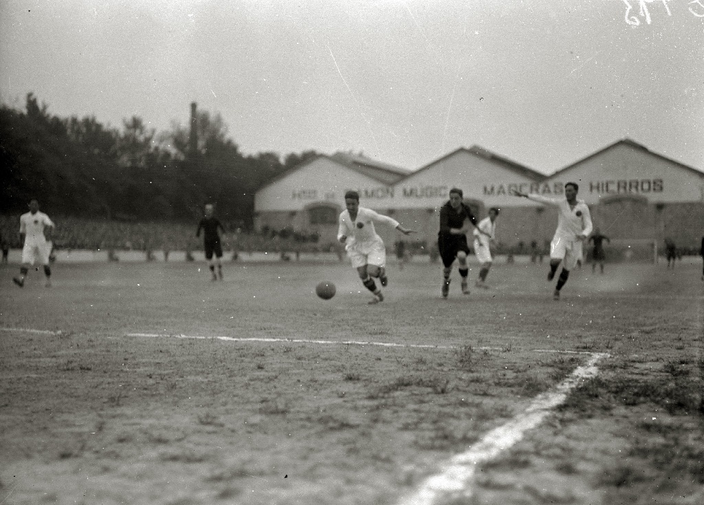 Título original: Escenas de la final de Campeonato de España en el campo de Atotxa entre los equipos del Real Unión y Real Madrid (1-0) (14/18) Localización: San Sebastián (Guipúzcoa)